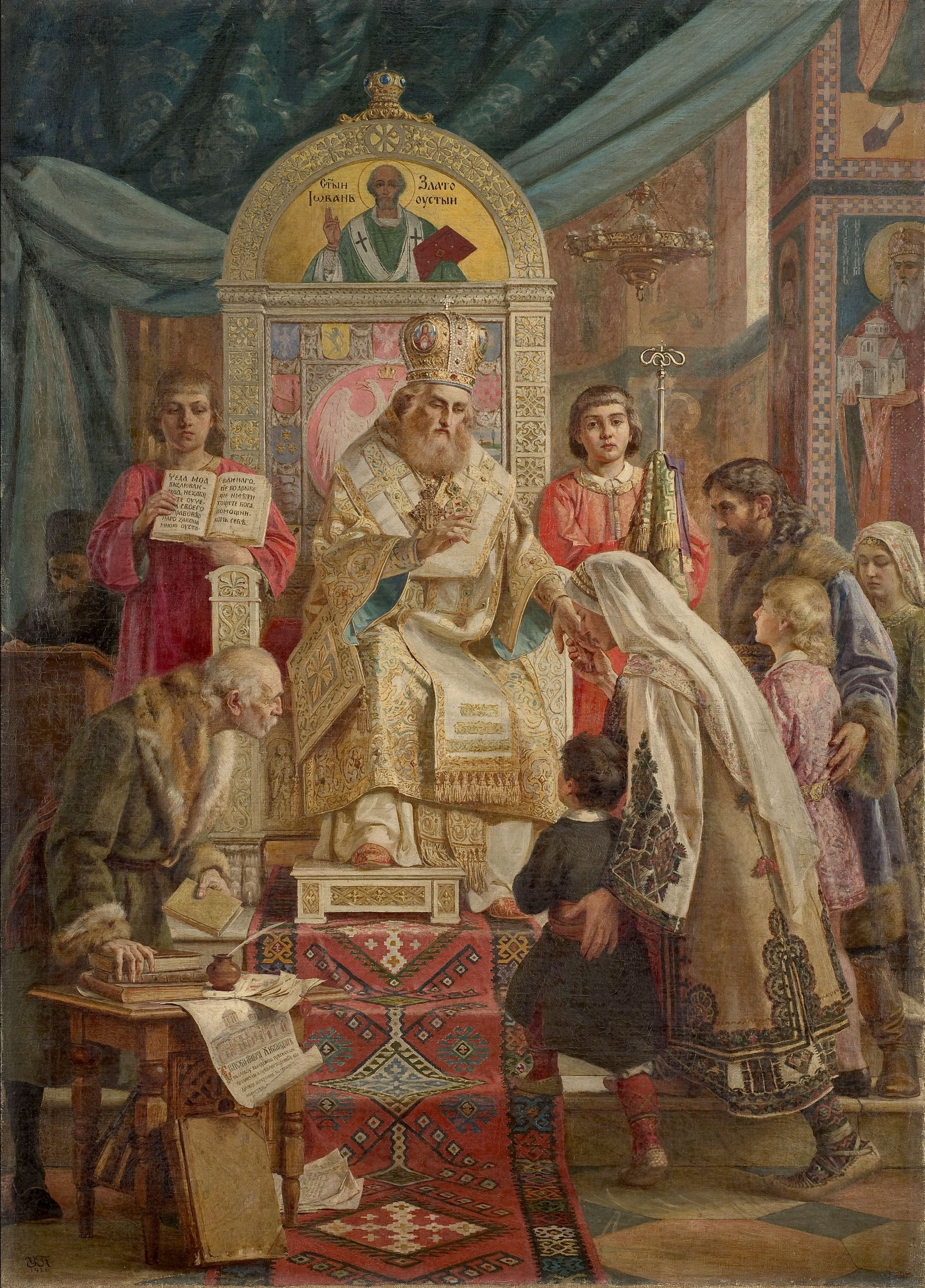 Свети Сава благосиља Српчад, дело Уроша Предића 1921.